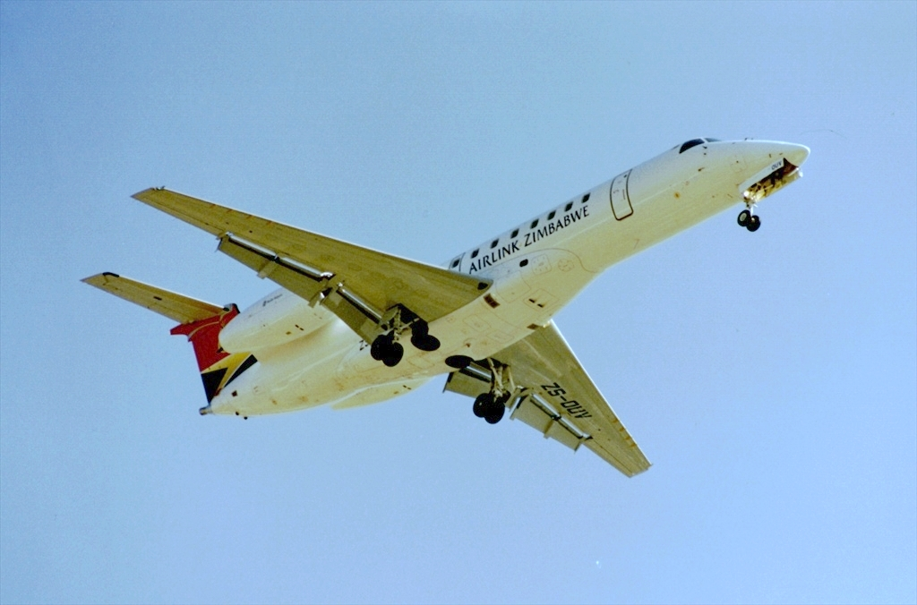 Airlink Zimbabwe ERJ135-LR ZS-OUV